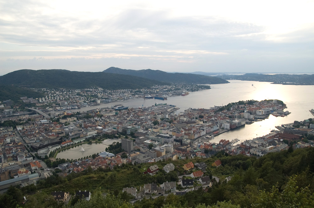 Bergen, Norway, as seen from Fløyen.